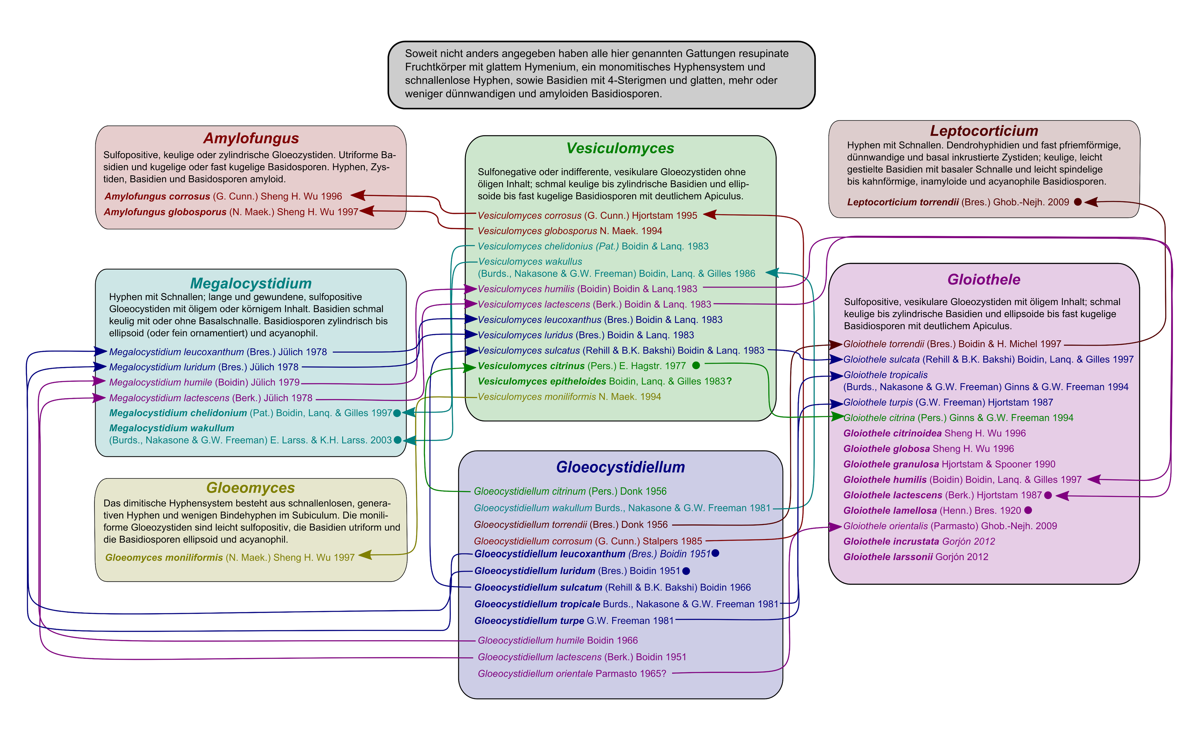 Das Schema zeigt die nach wie vor umstrittene, taxonomische Einordnung von Gloiothele-Arten in verschiedene verwandte, beziehungsweise morphologisch ähnlichen Gattungen. Für jedes Taxon wird der wissenschaftliche Name (hier fett dargestellt) samt seinen aktuellen Synonymen angegeben. Arten, die molekularbiologisch untersucht wurden, sind durch einen Kreis gekennzeichnet, Arten, deren Artrang umstritten ist, durch ein Fragezeichen. Artnamen und Synonyme stammen von den beiden Taxonomie-Datenbanken Mycobank und Index Fungorum. References 1. Bernicchia, A.; Gorjón, S.P.: 2010. Fungi Europaei - Corticiaceae s.l. 12:1-1008 2. Ghobad-Nejhad, M.: 2009. A new species and new combinations in the corticioid genus Gloiothele (Basidiomycota). Mycotaxon. 110:261-270 3. Wu, S.H.: 1996. Studies on Gloeocystidiellum sensu lato (Basidiomycotina) in Taiwan. Mycotaxon 58:1-68 3. Mycobank ( 4. Index Fungorum (